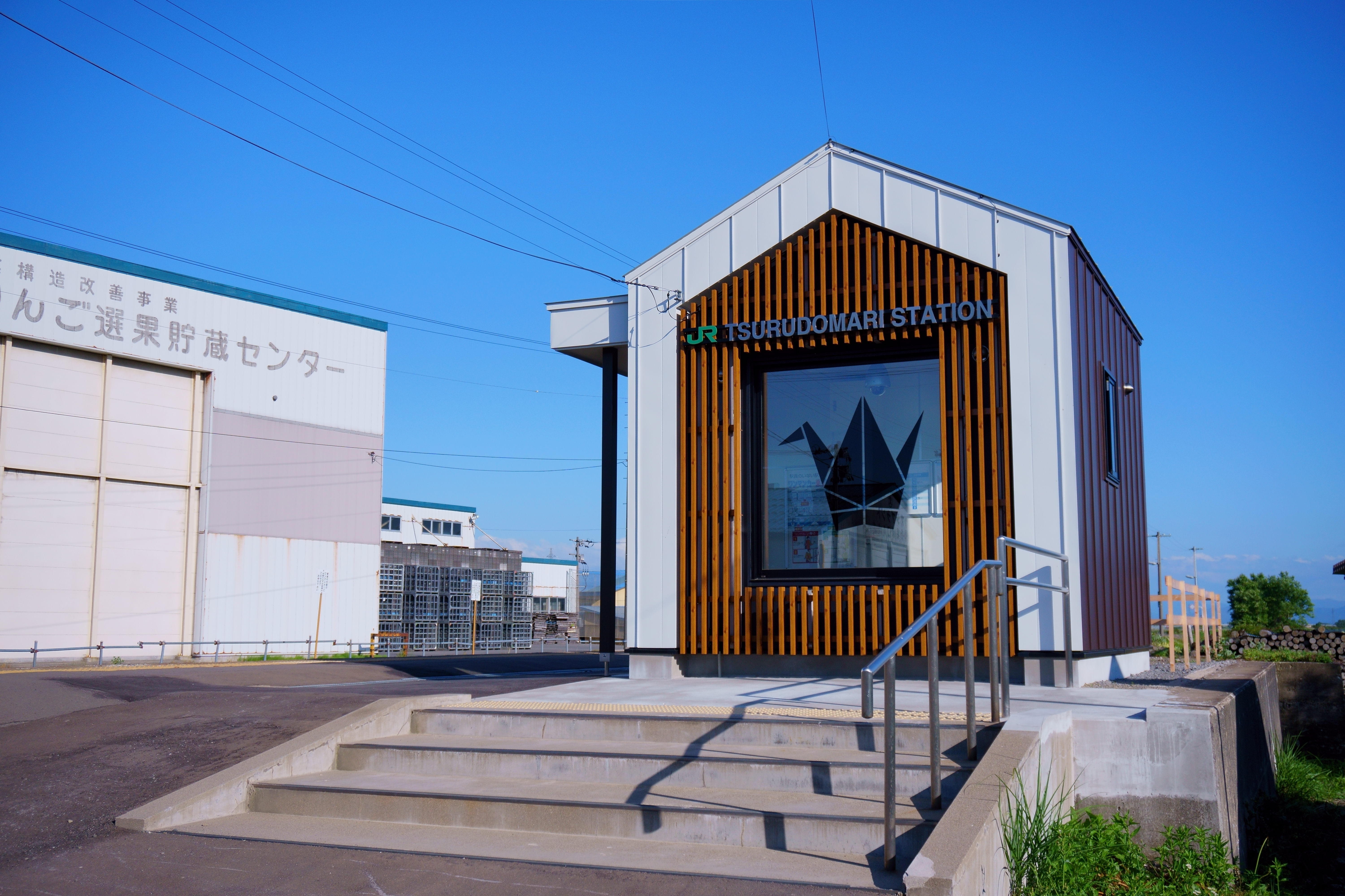 五能線 鶴泊駅（青森県北津軽郡鶴田町）。2020年3月に新駅舎が竣工した。